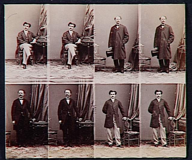 Collection Maurice Levert ; Collection Disdéri-Armées de la terre.